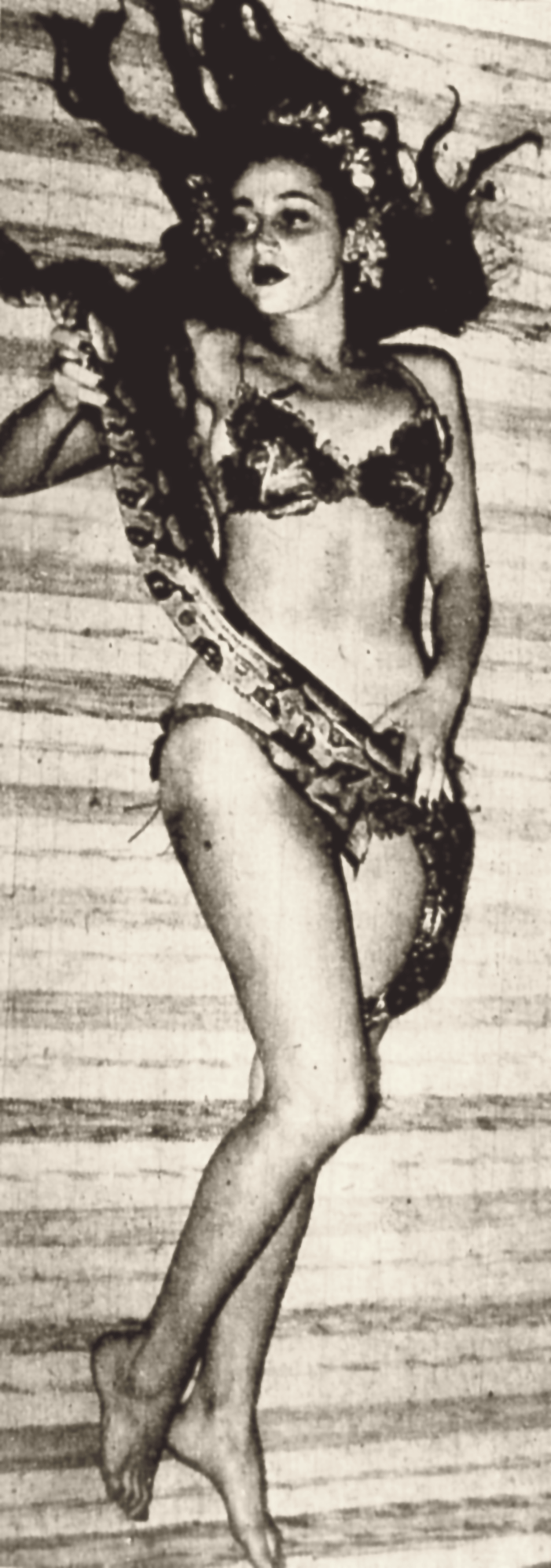 A vedete brasileira Luz del Fuego em 1944, fotografada com uma cobra na revista Carioca.